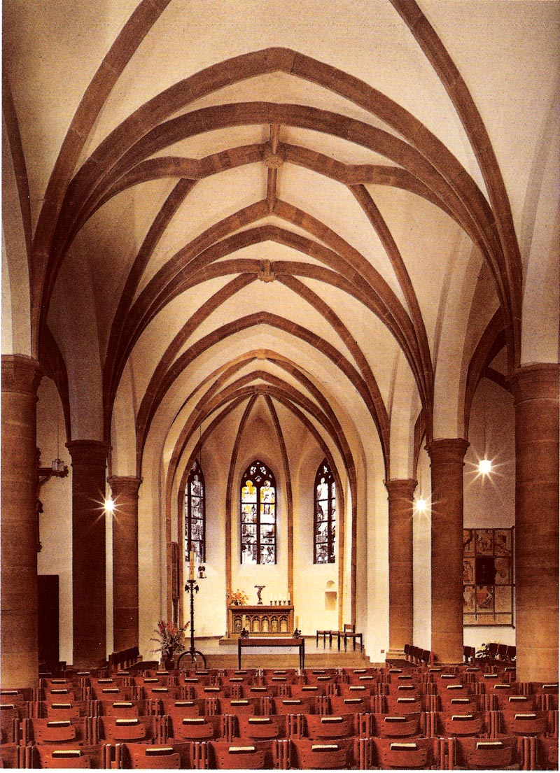 Innenraum der Kirche St. Laurentius Marmagen von Westen